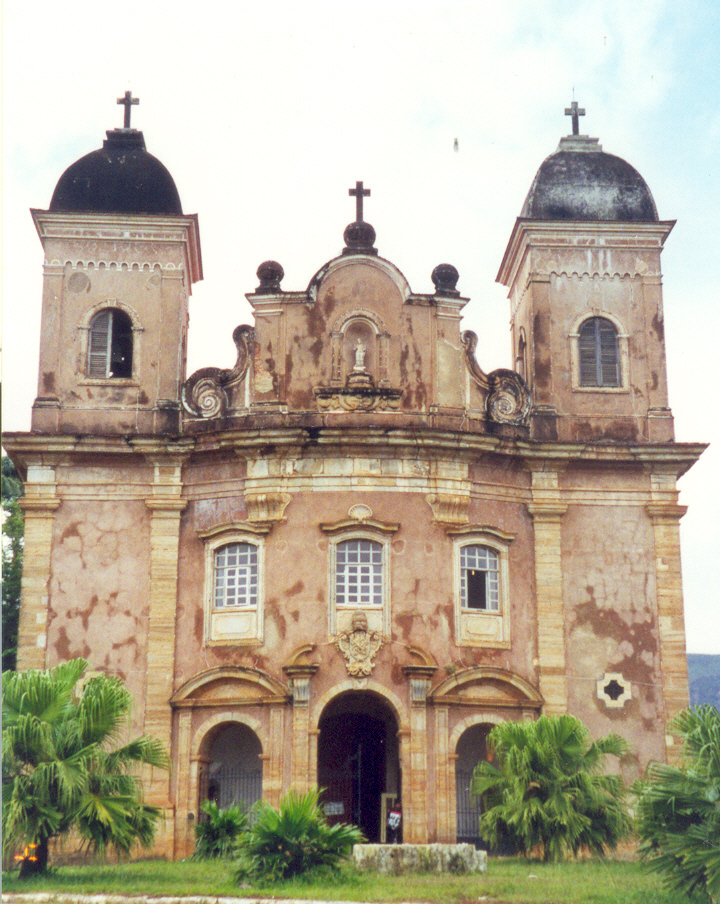 "Igreja de São Pedro dos Clérigos" in MAriana, Brazil